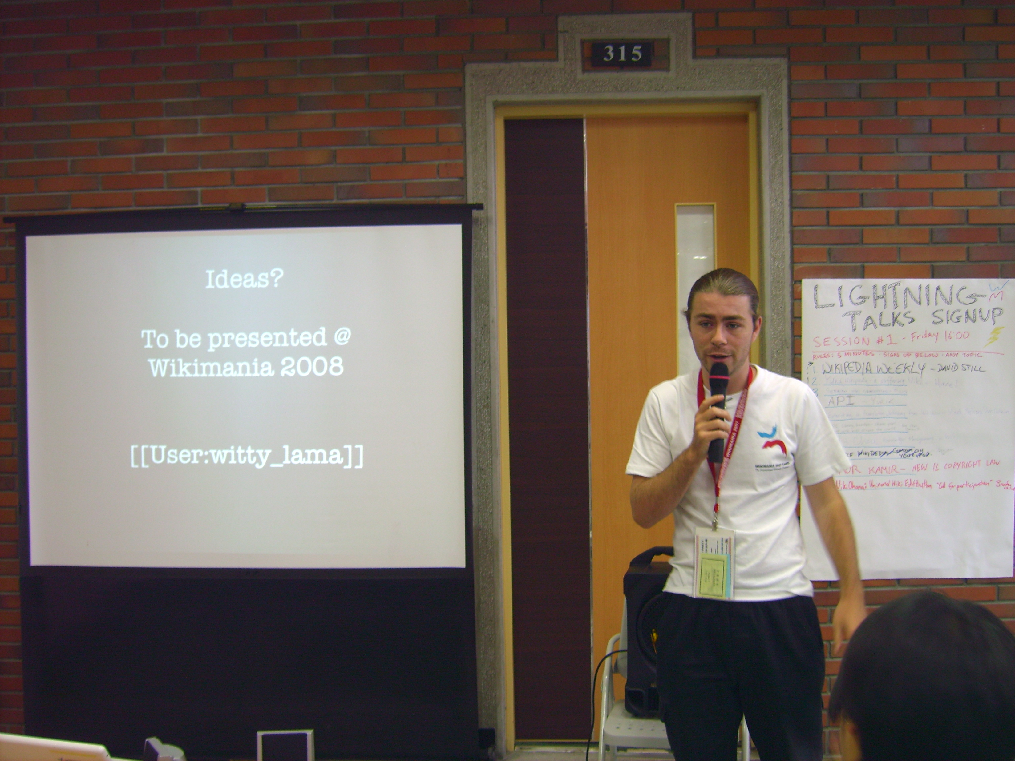 Wikimania 2007 Session 906 Lightning Talk: Liam Wyatt.